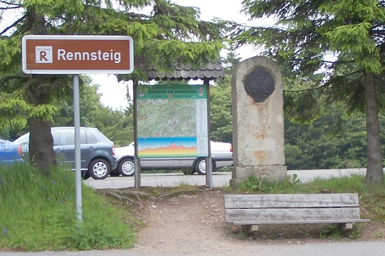 Die Grenzwiese am Kleinen Inselsberg mit Grenzadler am Rennsteig bei Brotterode und Tabarz/Thür. Wald.